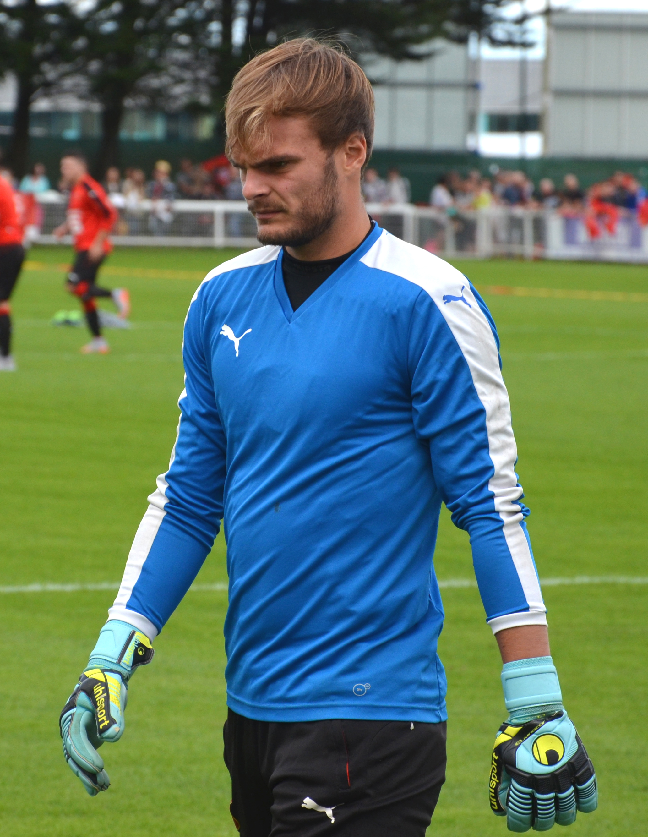 Photographie prise lors d'un entraînement du Stade rennais délocalisé à Dinan. Ici, Maxime Pattier.